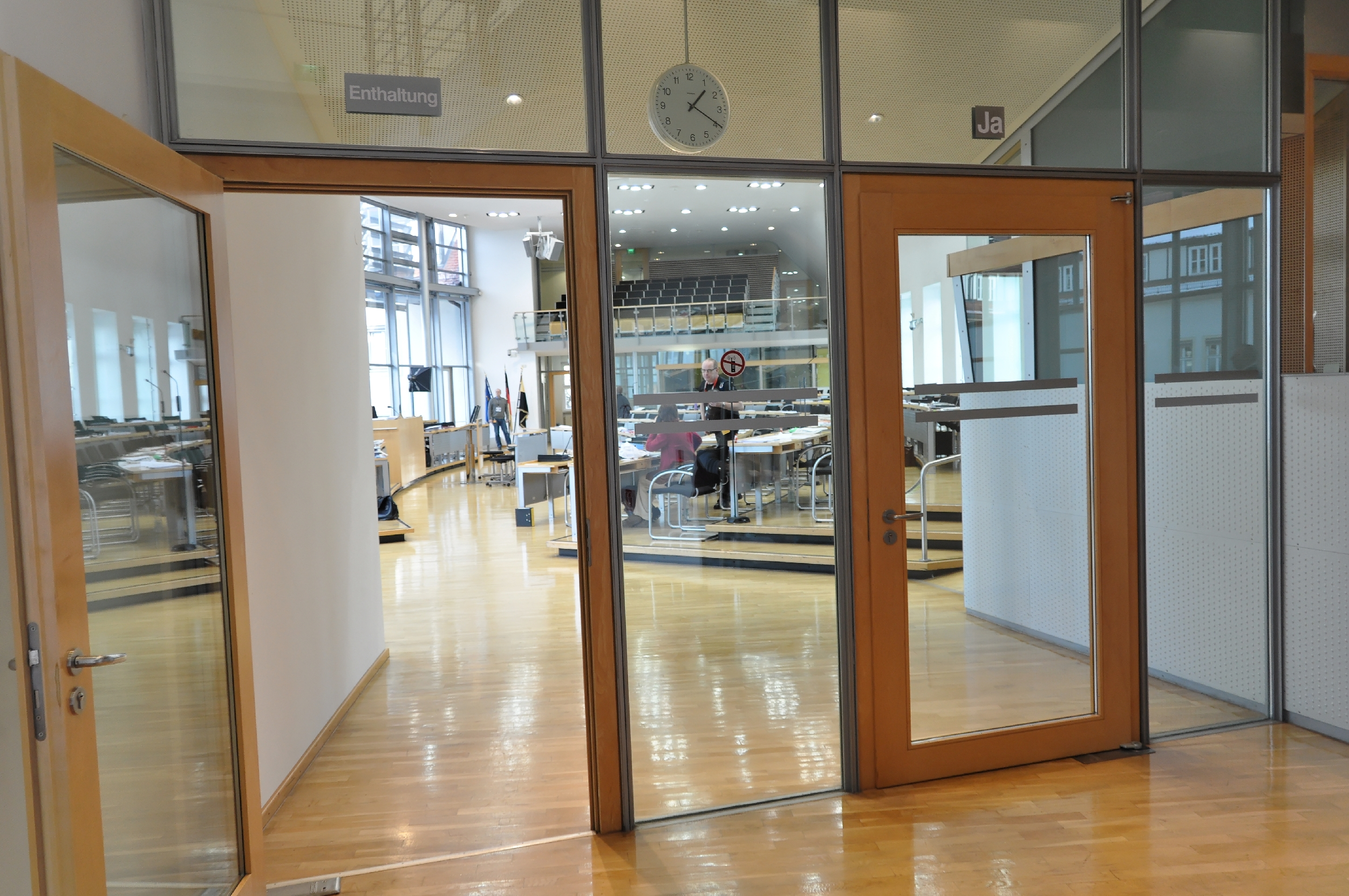 Fotos vom Landtagsprojekt Sachsen-Anhalt 2012